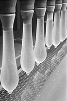 Qualitätstest: Elektrischer Lochtest